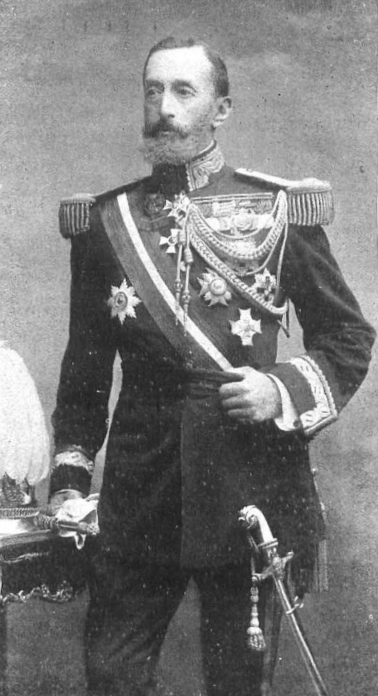 Joaquín Milans del Bosch. Comandante General de Ceuta., obra del fotógrafo Kaulak.